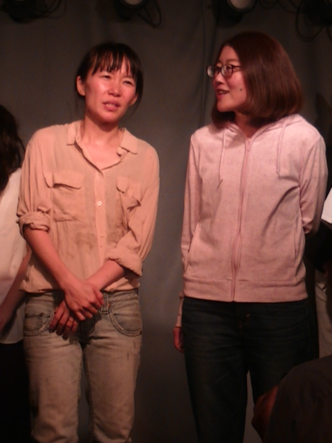 ワチュワナドゥ (2018年9月)